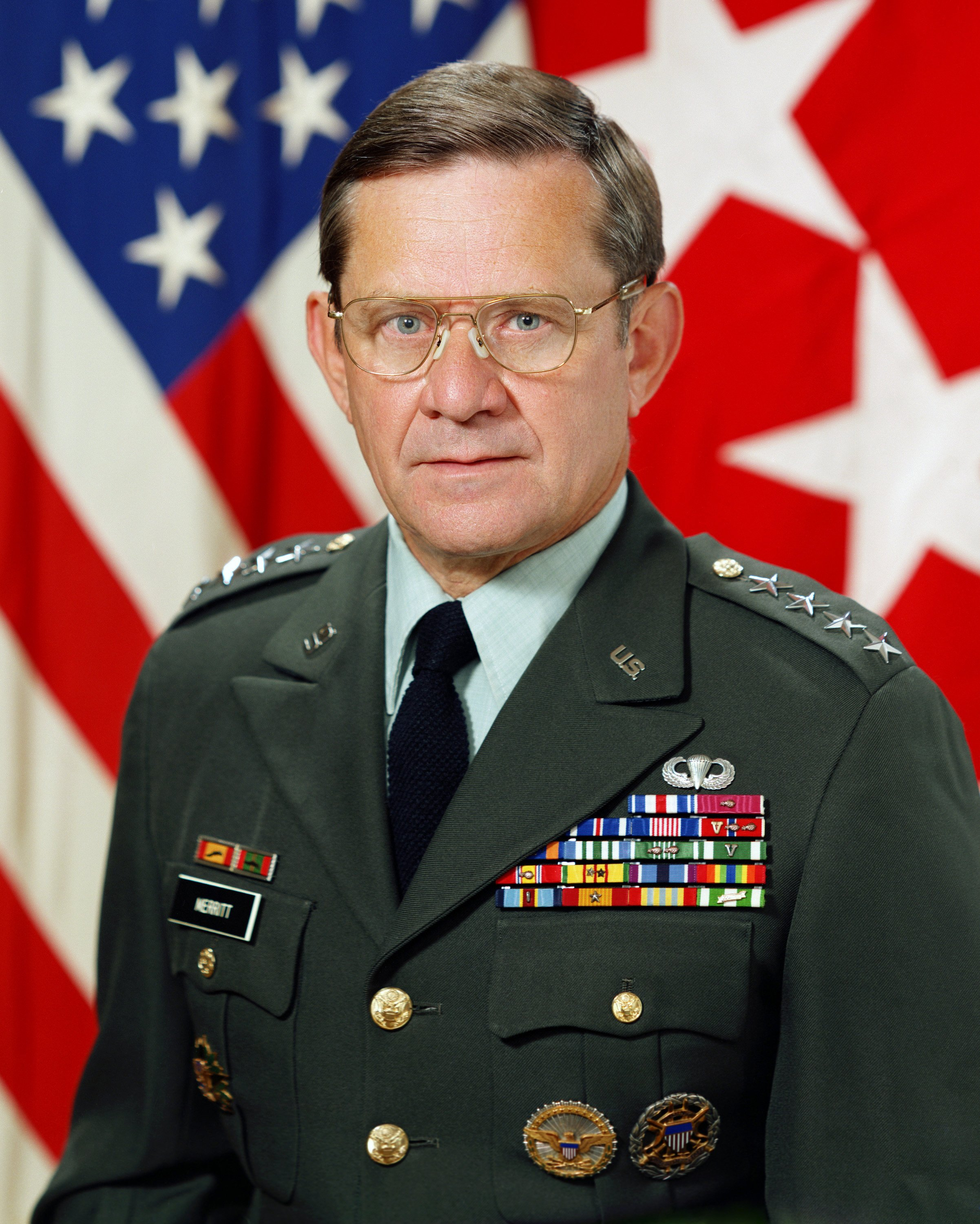 Gen. Jack N. Merritt